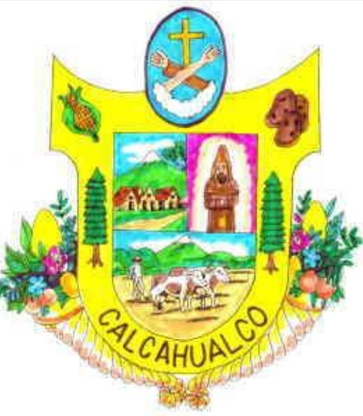 Heráldica del municipio de Calcahualco